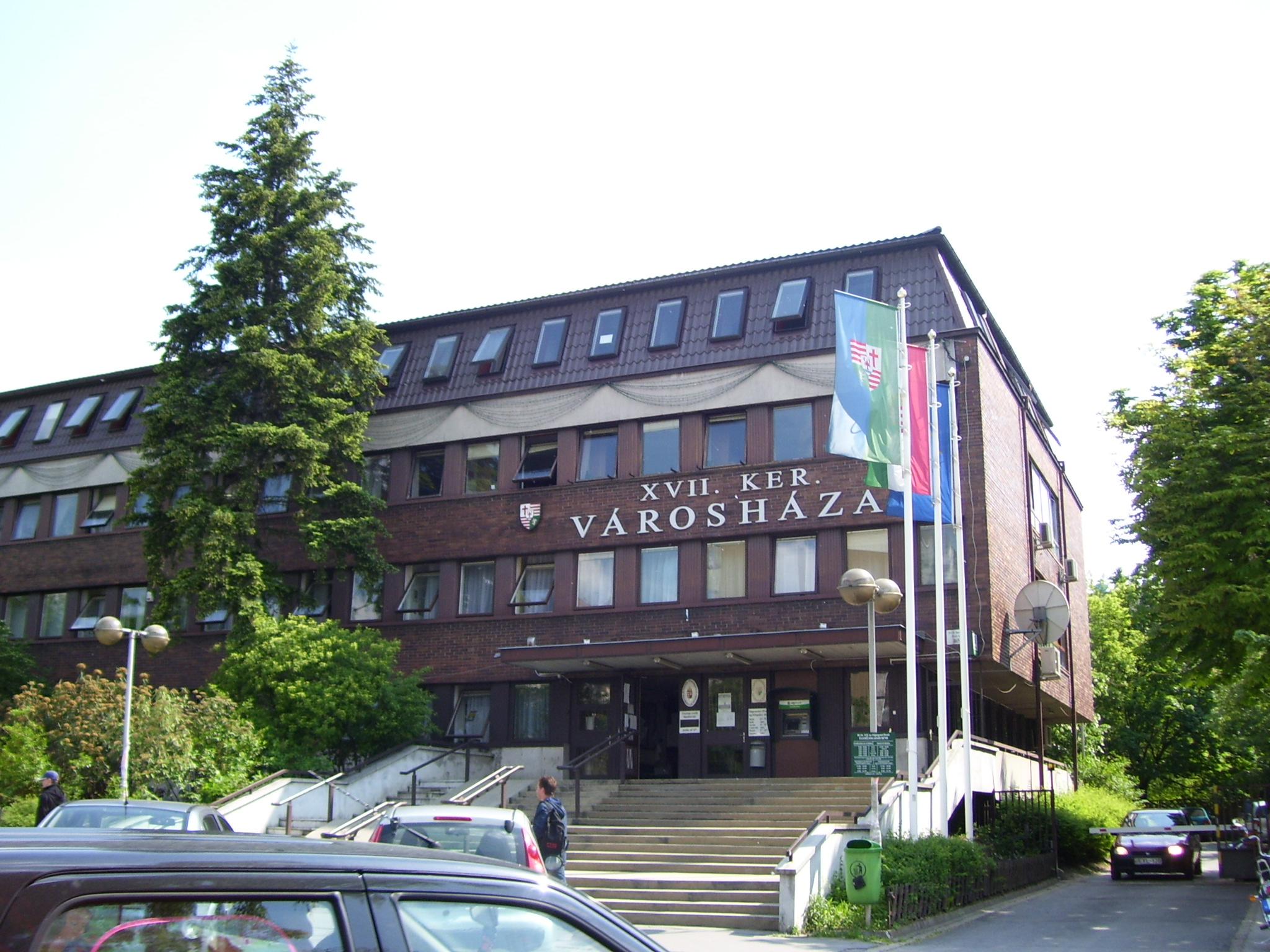 Budapest, XVII. kerületi városháza épülete (tervezte ifjabb Rimanóczy Gyula)